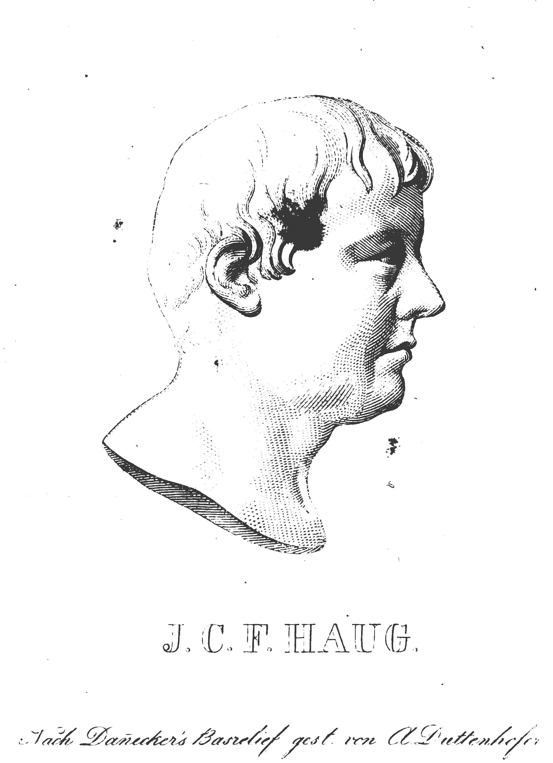 Anton Duttenhofer: Friedrich Haug, Kupferstich nach einem Gips-Reliefmedaillon von Johann Heinrich Dannecker, 1840.